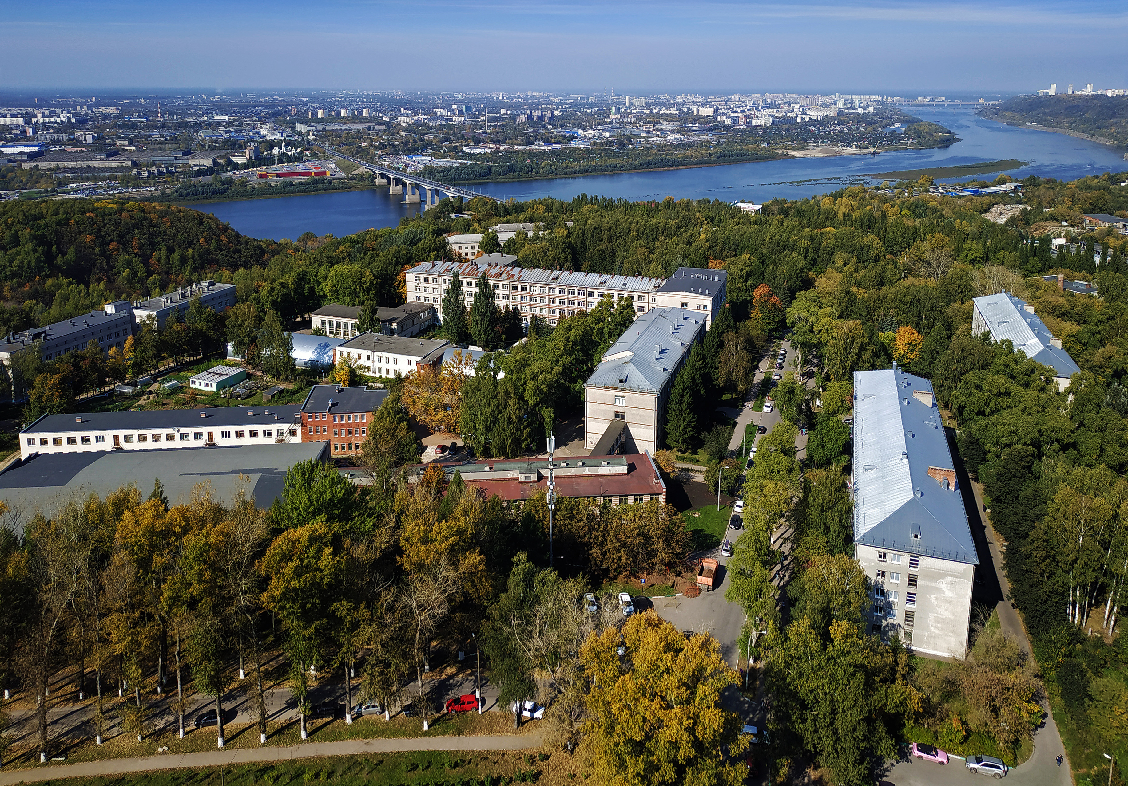 Нижний Новгород. Вид на корпуса Сельскохозяйственной Академии (на переднем плане) и Мызинский мост через Оку (на заднем плане)